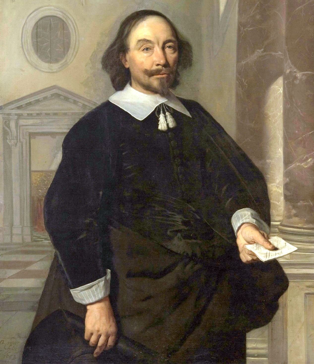 Michael Heusch (1601-1684), erster Präsident der Handelskammer Hamburg